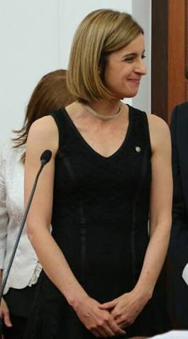 El gobernador Miguel Lifschitz le toma juramento a sus ministros